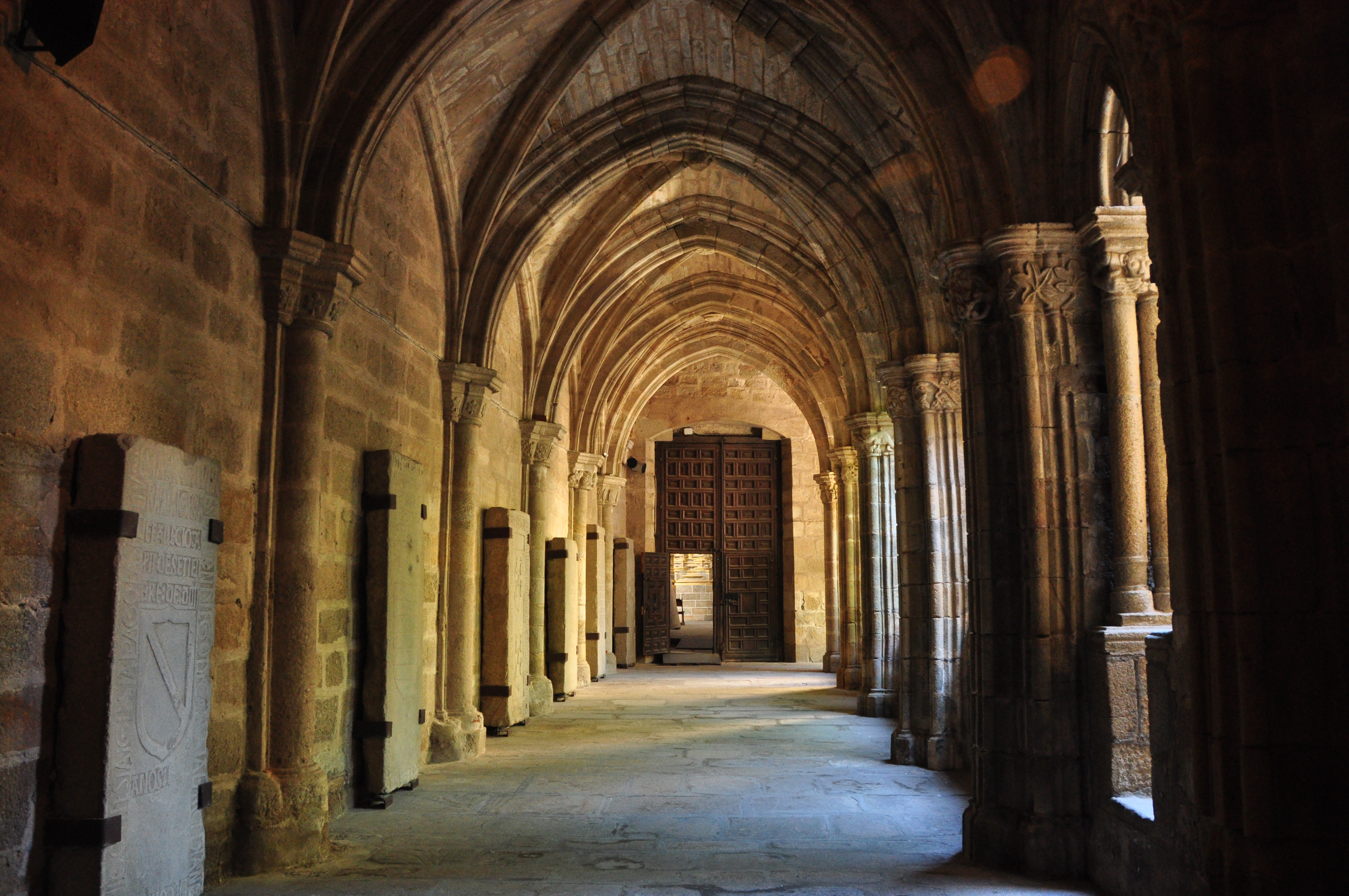 Claustro de la Catedral Vieja de Plasencia. Al fondo, puerta de acceso a la Catedral Nueval.